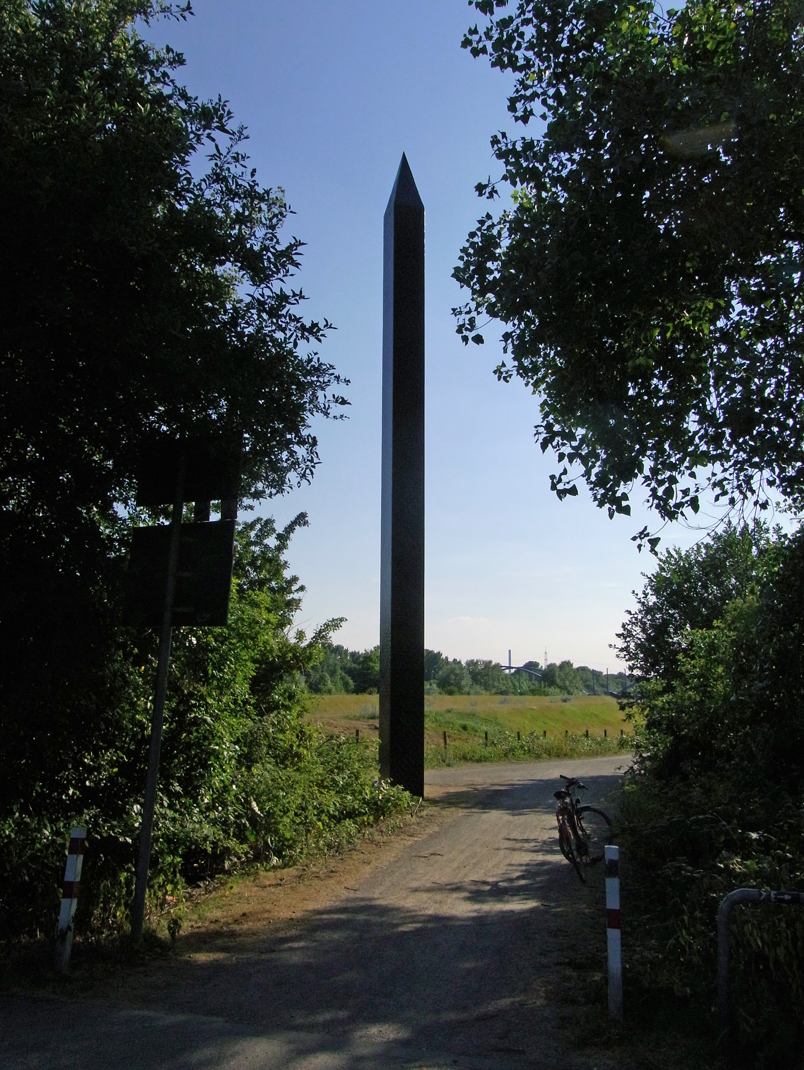 Emscherkunst.2010 Rita McBride: Carbon Obelisk